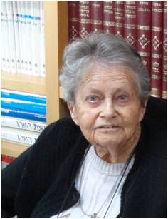 אמונה ירון